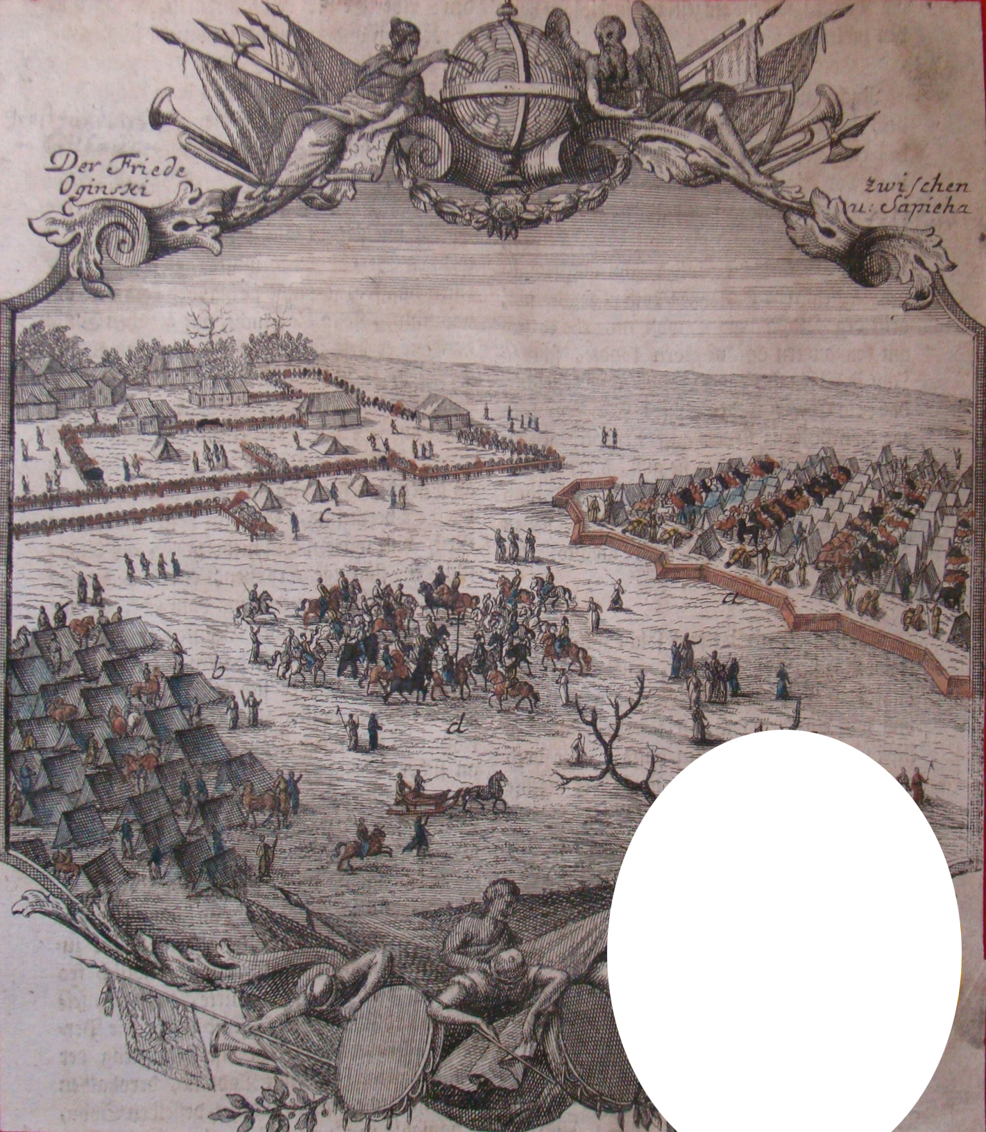 Беларуская (тарашкевіца): Мір паміж Агінскім (Aginski) і Сапегам (Sapieha)